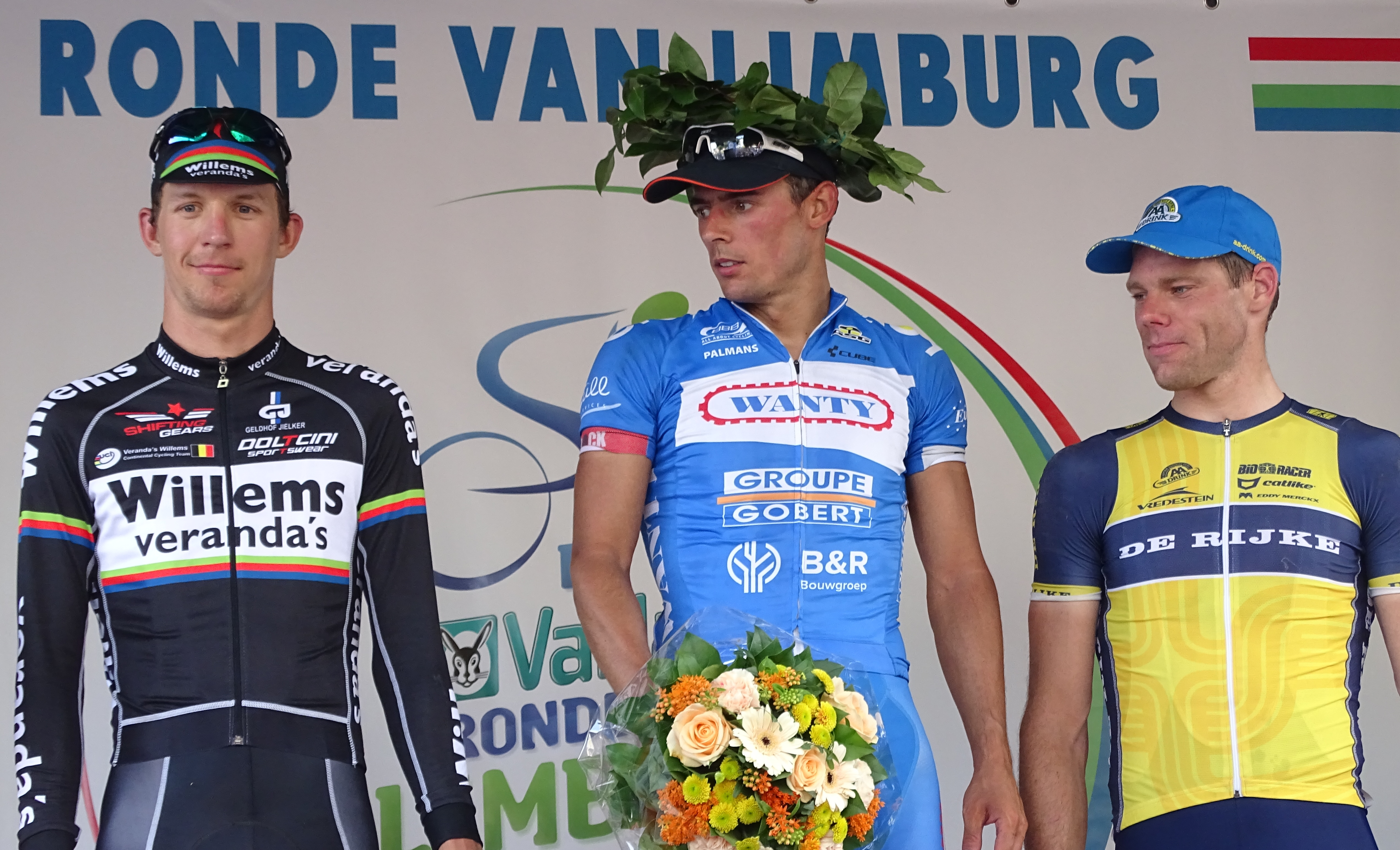 Reportage réalisé le dimanche 14 juin à l'occasion du départ et de l'arrivée du Tour du Limbourg 2015 à Tongres, Belgique.